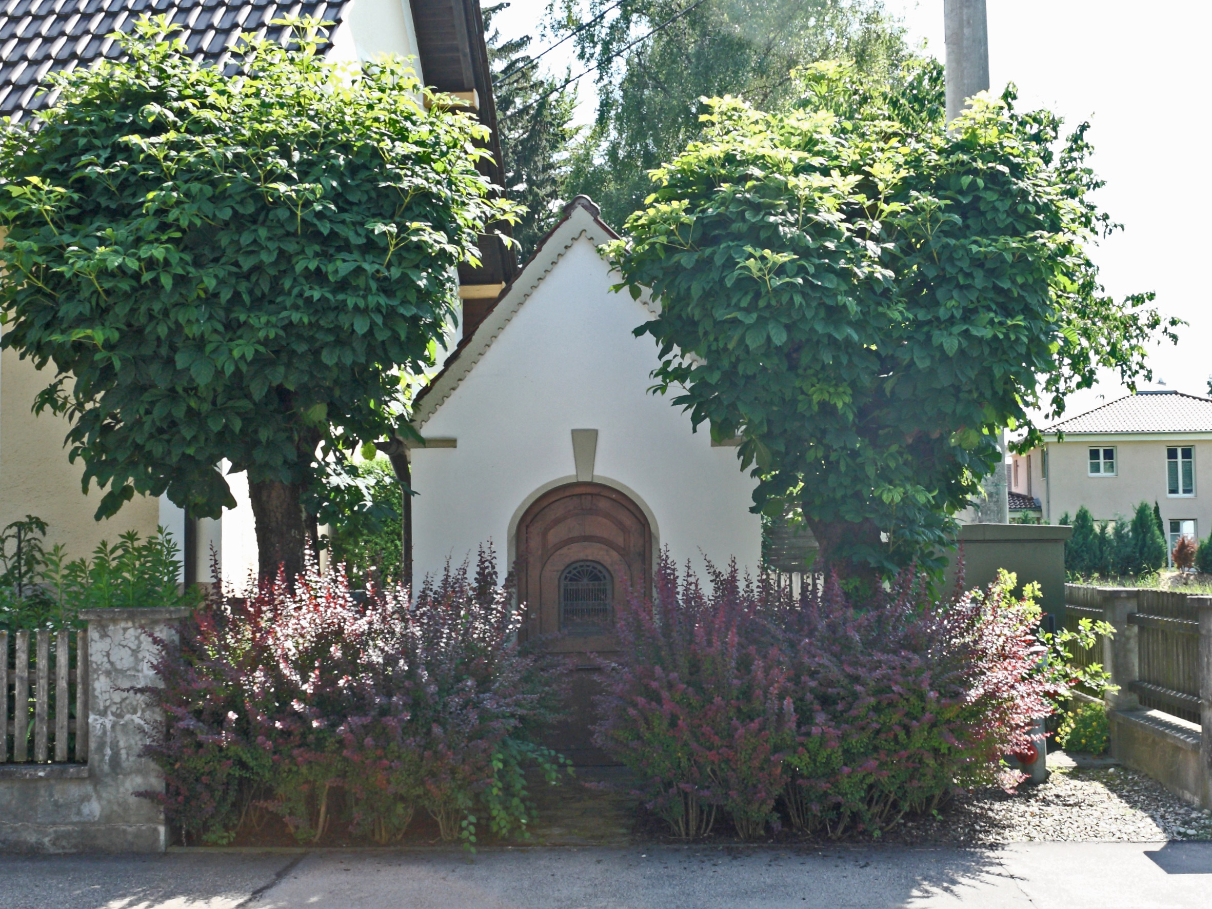 Ostansicht